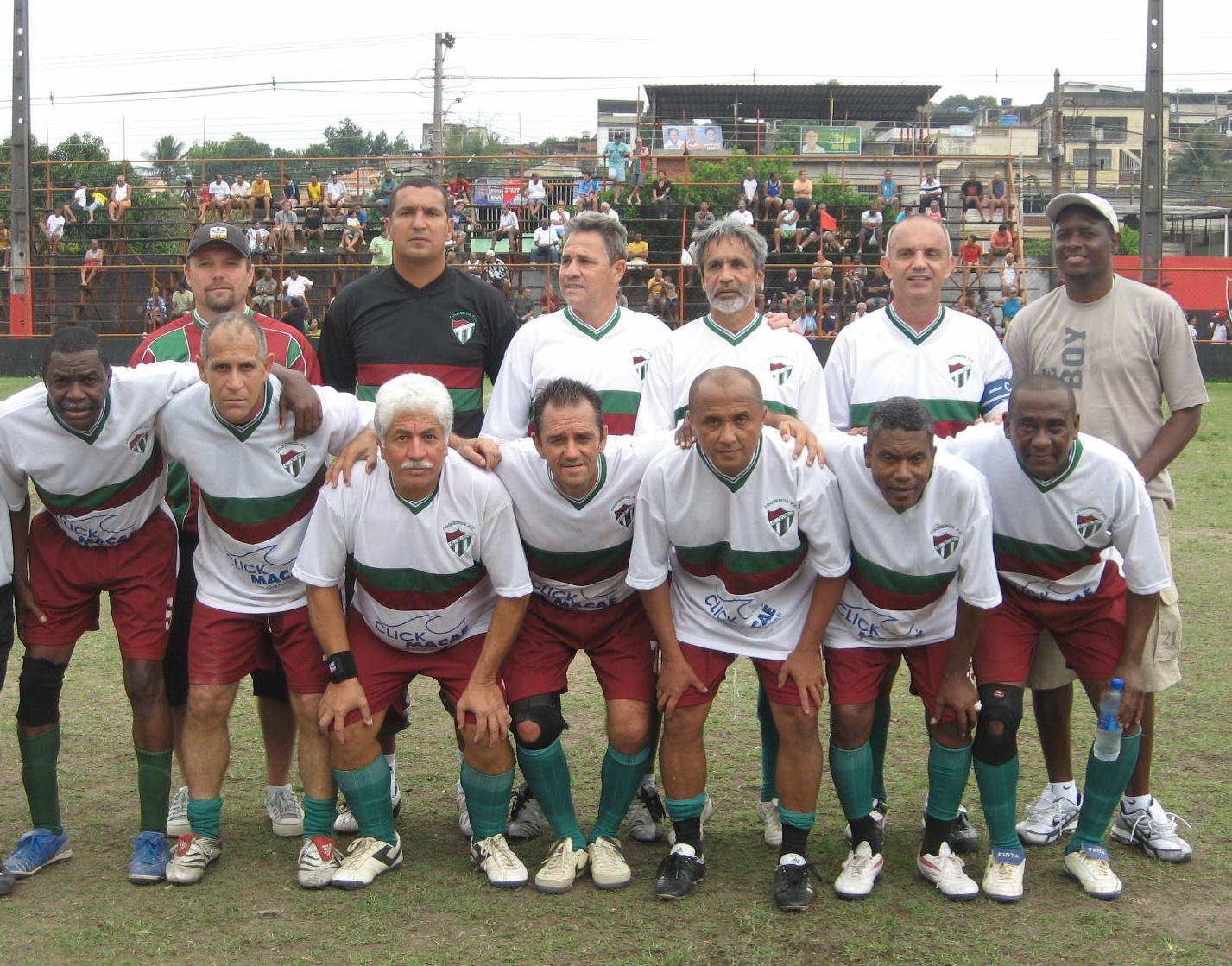 Formação bicampeã da Liga Independente de São João de Meriti, categoria Sub-50, do Coqueiros Futebol Clube.